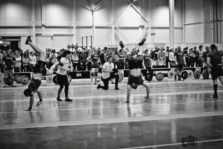 Международные соревнования в стиле CrossFit «Siberian Showdown 2015»